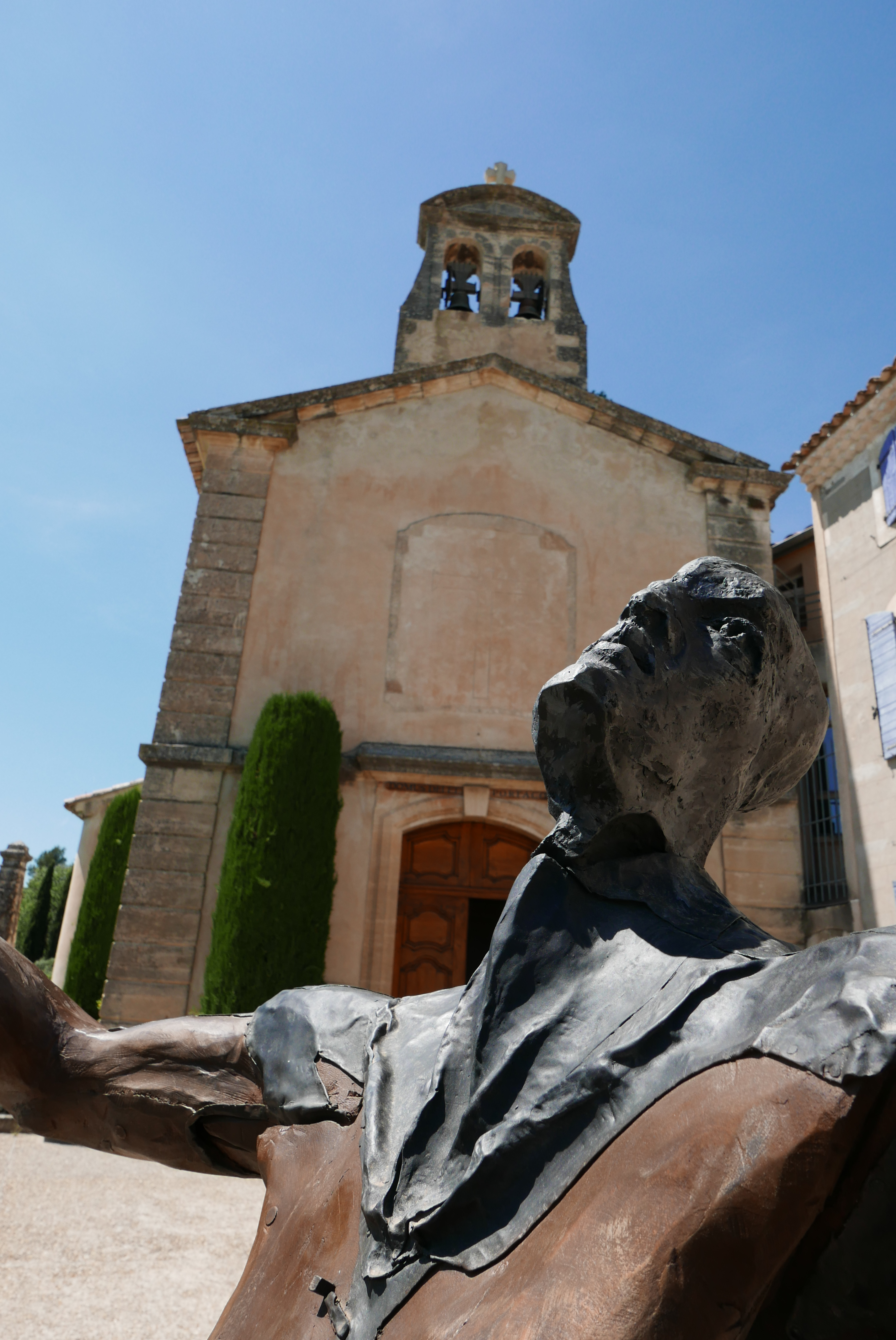 L'art dans le village de Joucas département du Vaucluse